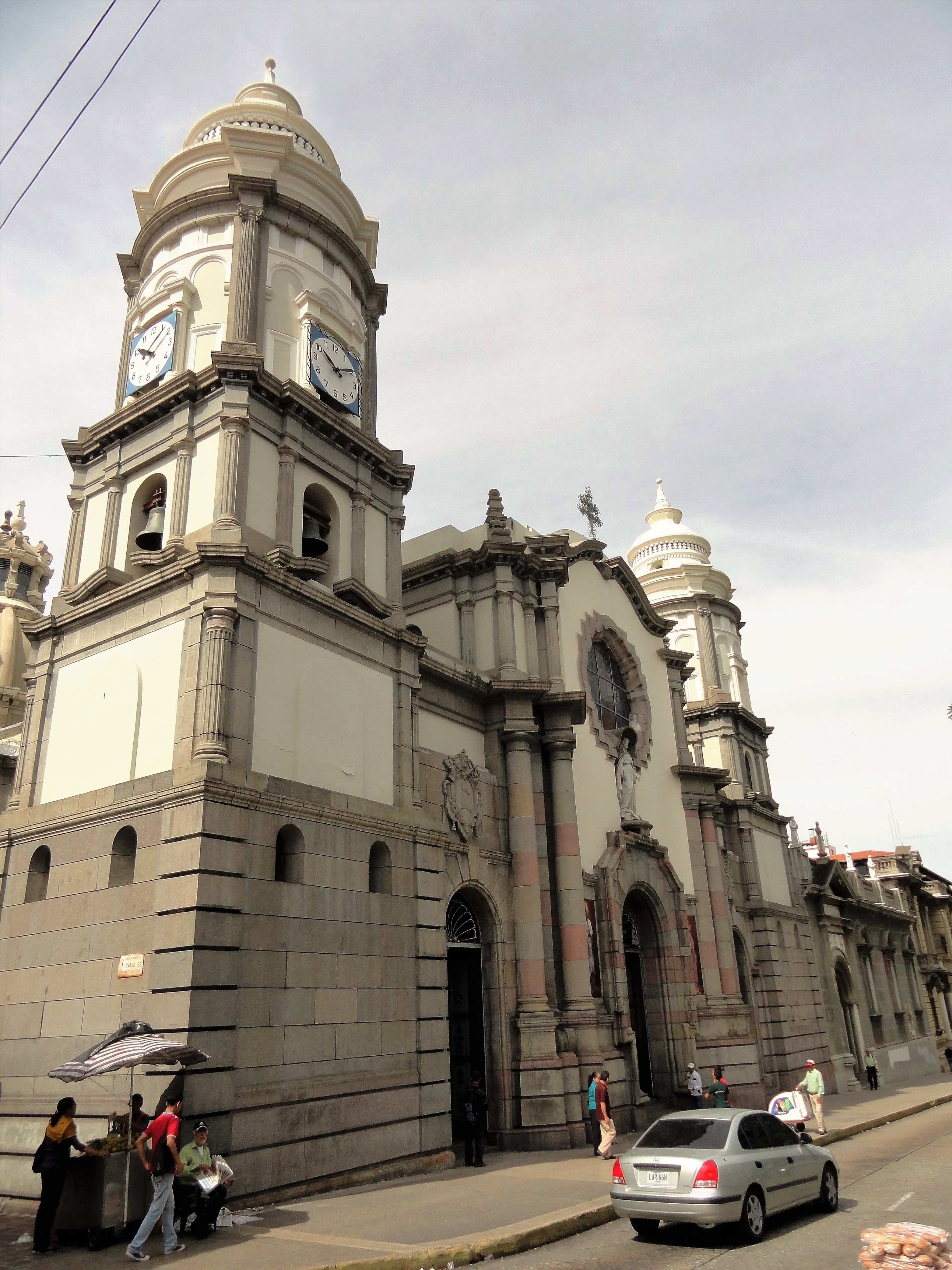 Basílica Menor de la Inmaculada Concepción